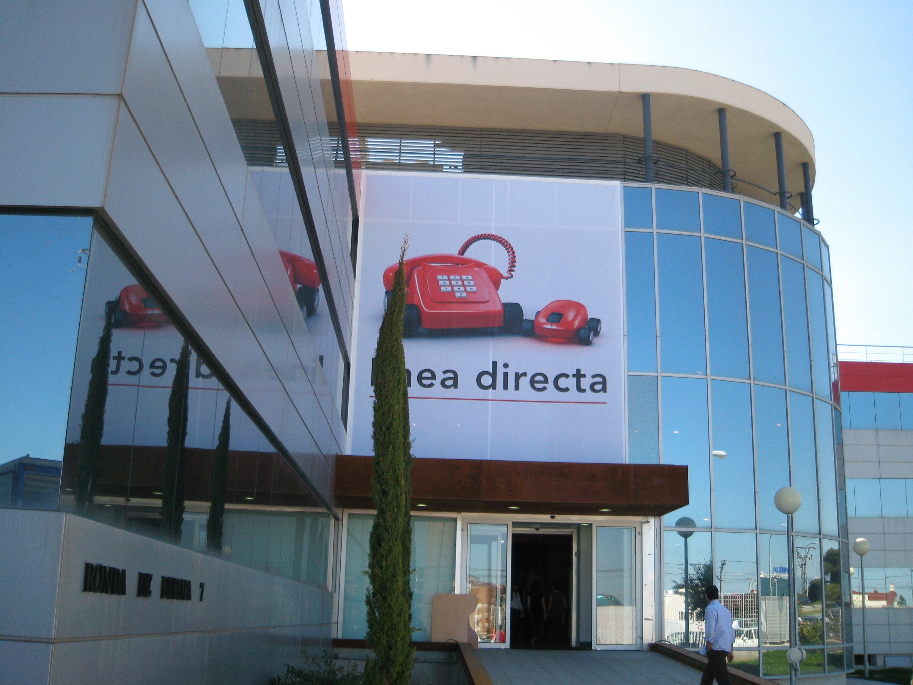 Fachada edificio central de Línea Directa Aseguradora